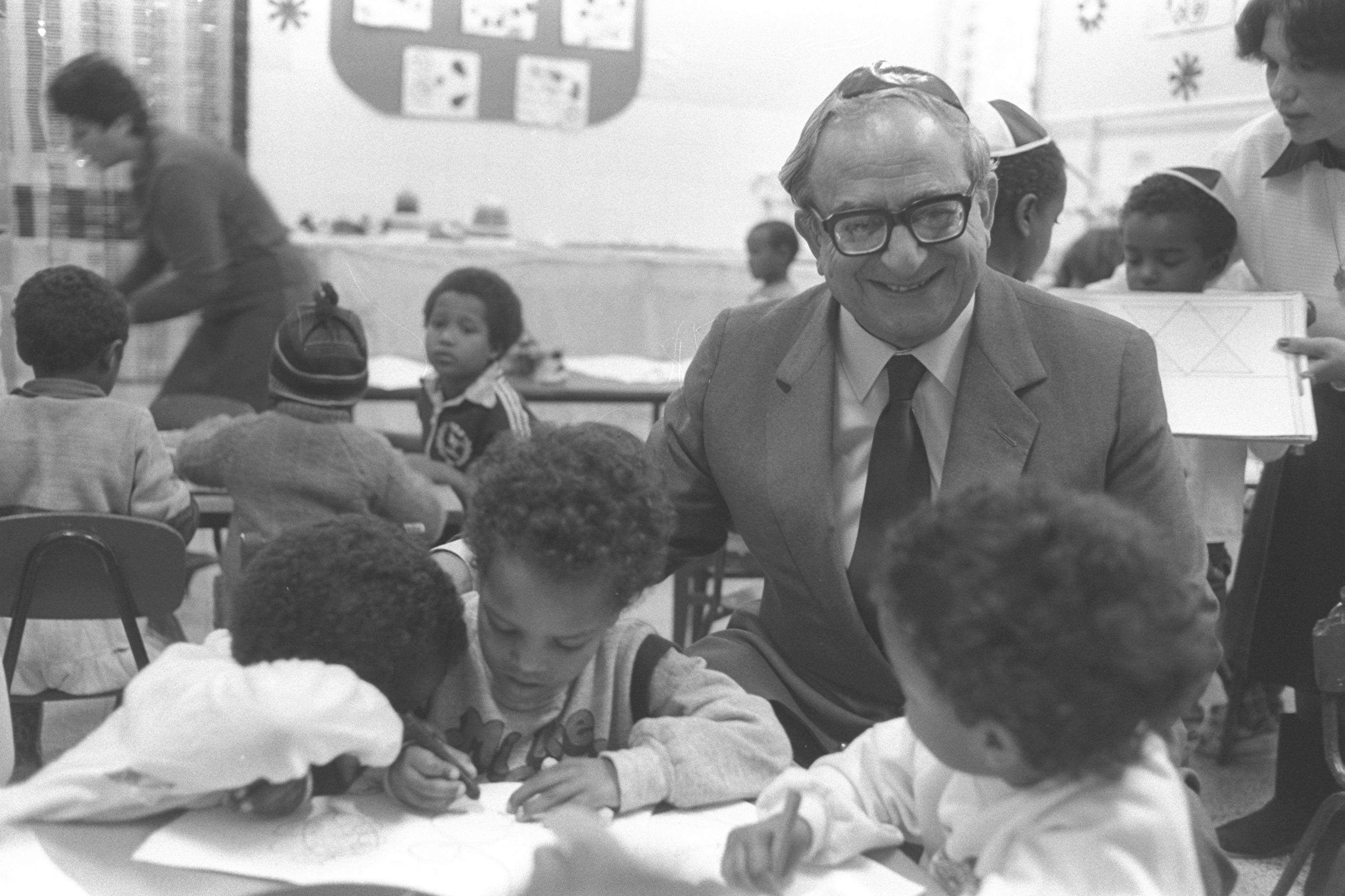 MIN. OF EDUCATION AND CULTURE YITZHAK NAVON VISITING A KINDERGARTEN CLASS OF YOUNG OLIM (IMMIGRANTS) FROM ETHIOPIA IN SCHOOL AT PARDES HANNA. ביקור שר החינוך יצחק נבון בגן הילדים בבית הספר לעולים חדשים שילה, בפרדס חנה. Photograph: HARNIK NATI, GPO. 15/01/1985